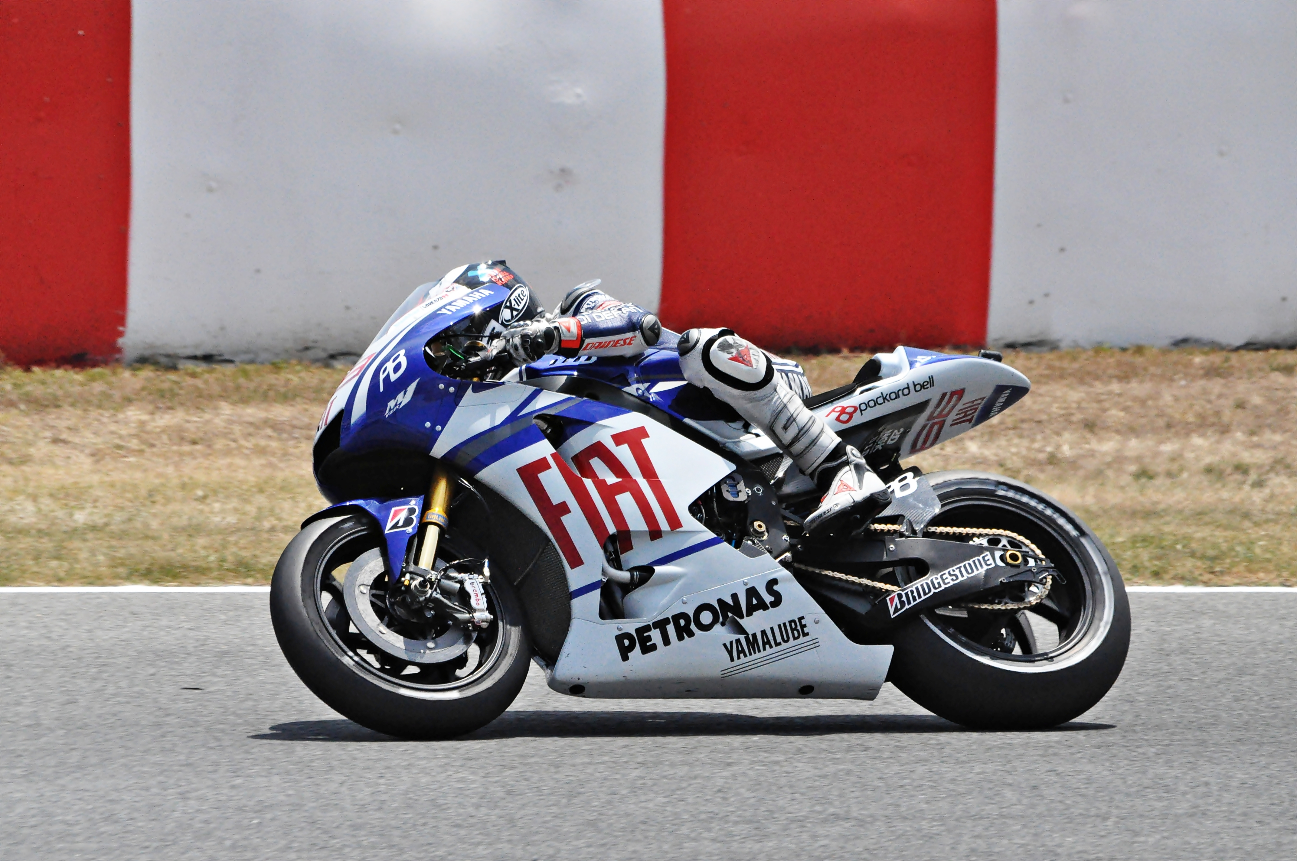 gran premio de cataluña de motogp